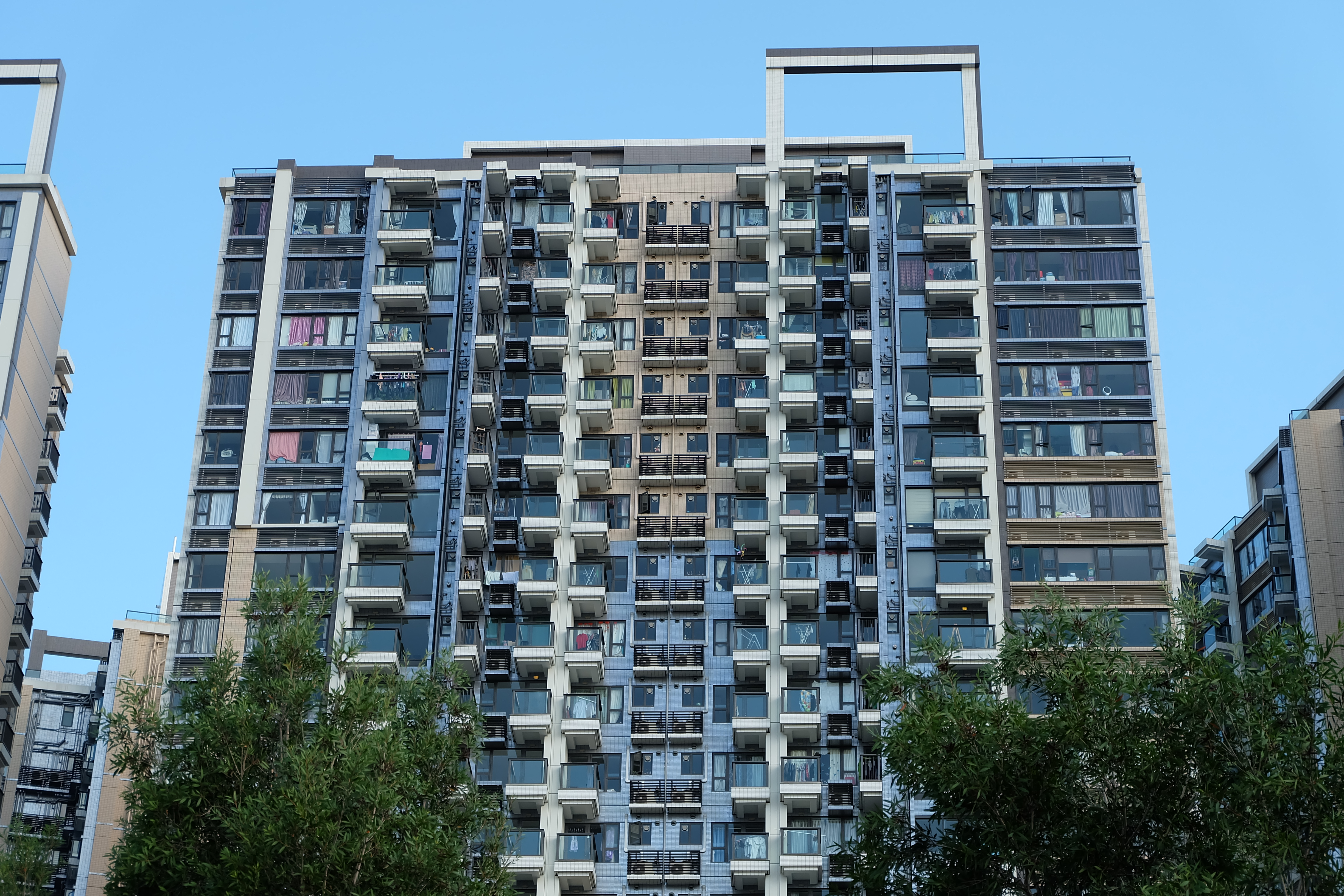 溱柏樓宇外觀